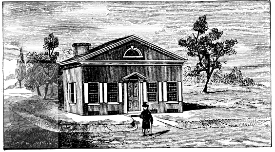 Loganian Library, Philadelphia